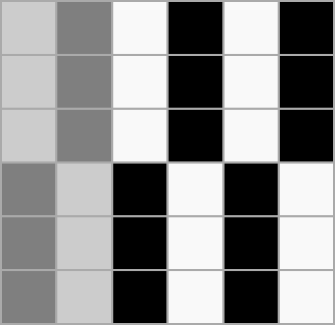 Основный репс 3/3.